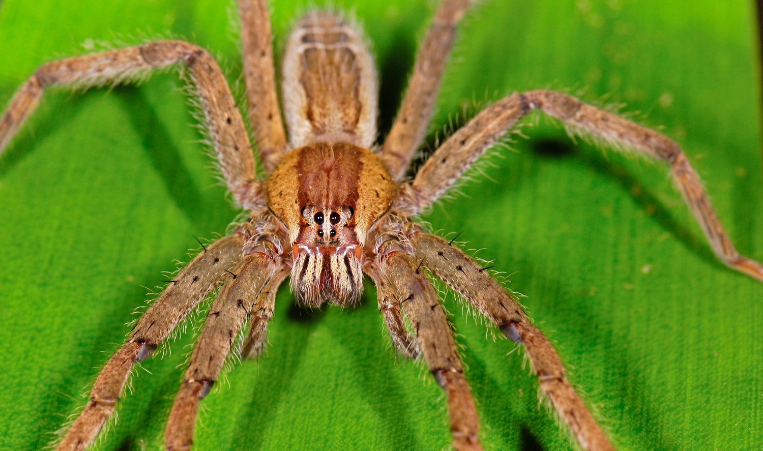 Cupiennius sp (F Ctenidae)